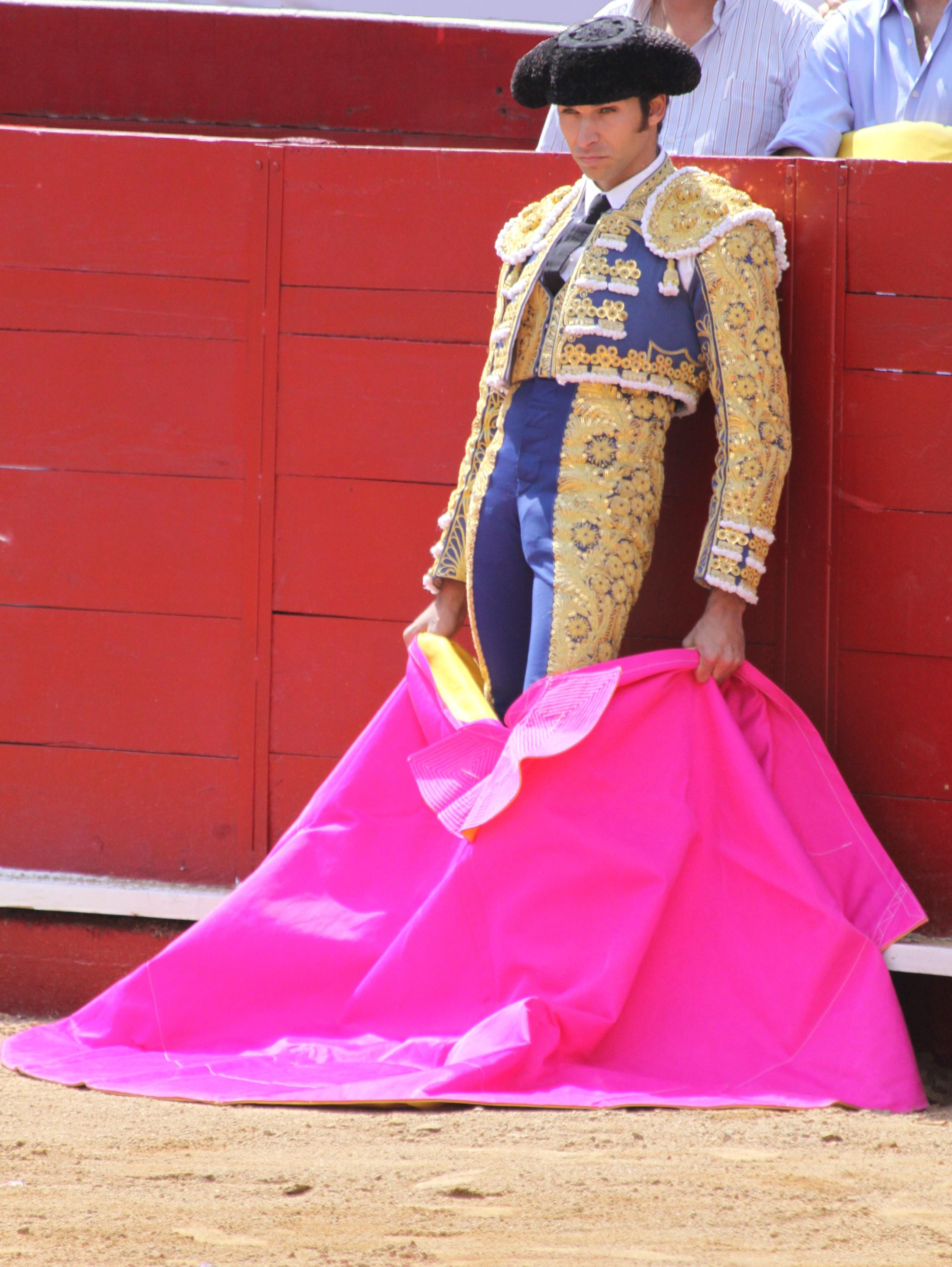 Cayetano Rivera Ordóñez, torero español.